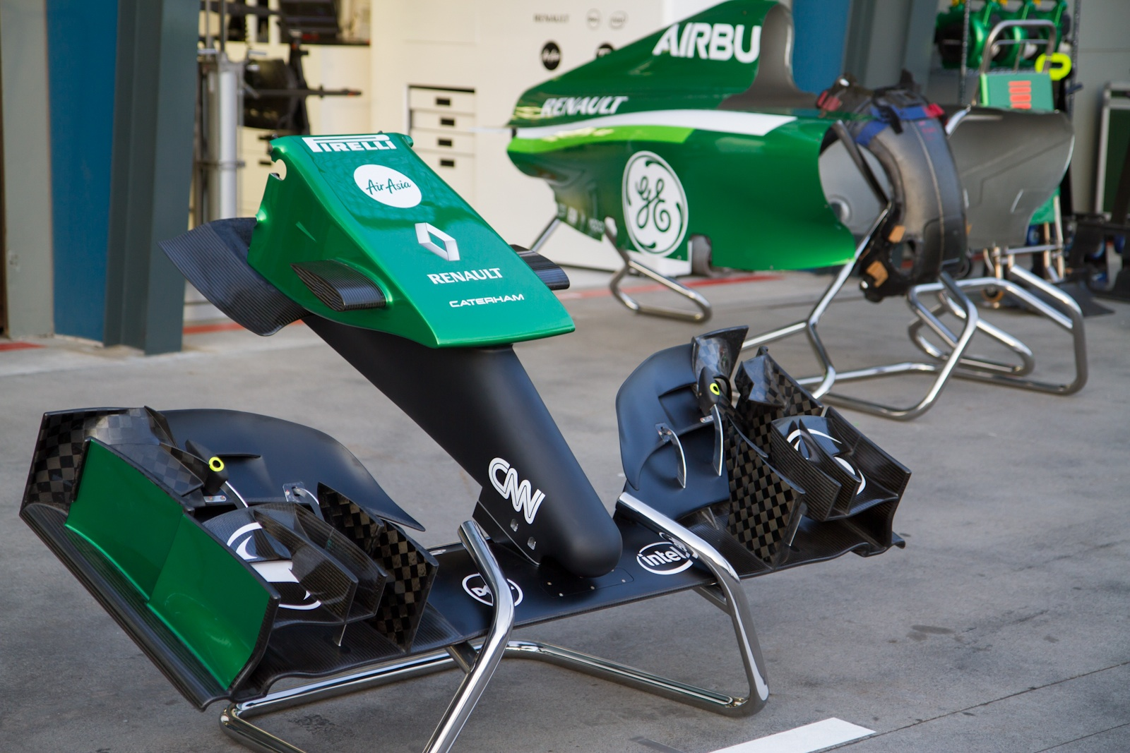 Caterham CT05 - framvinge